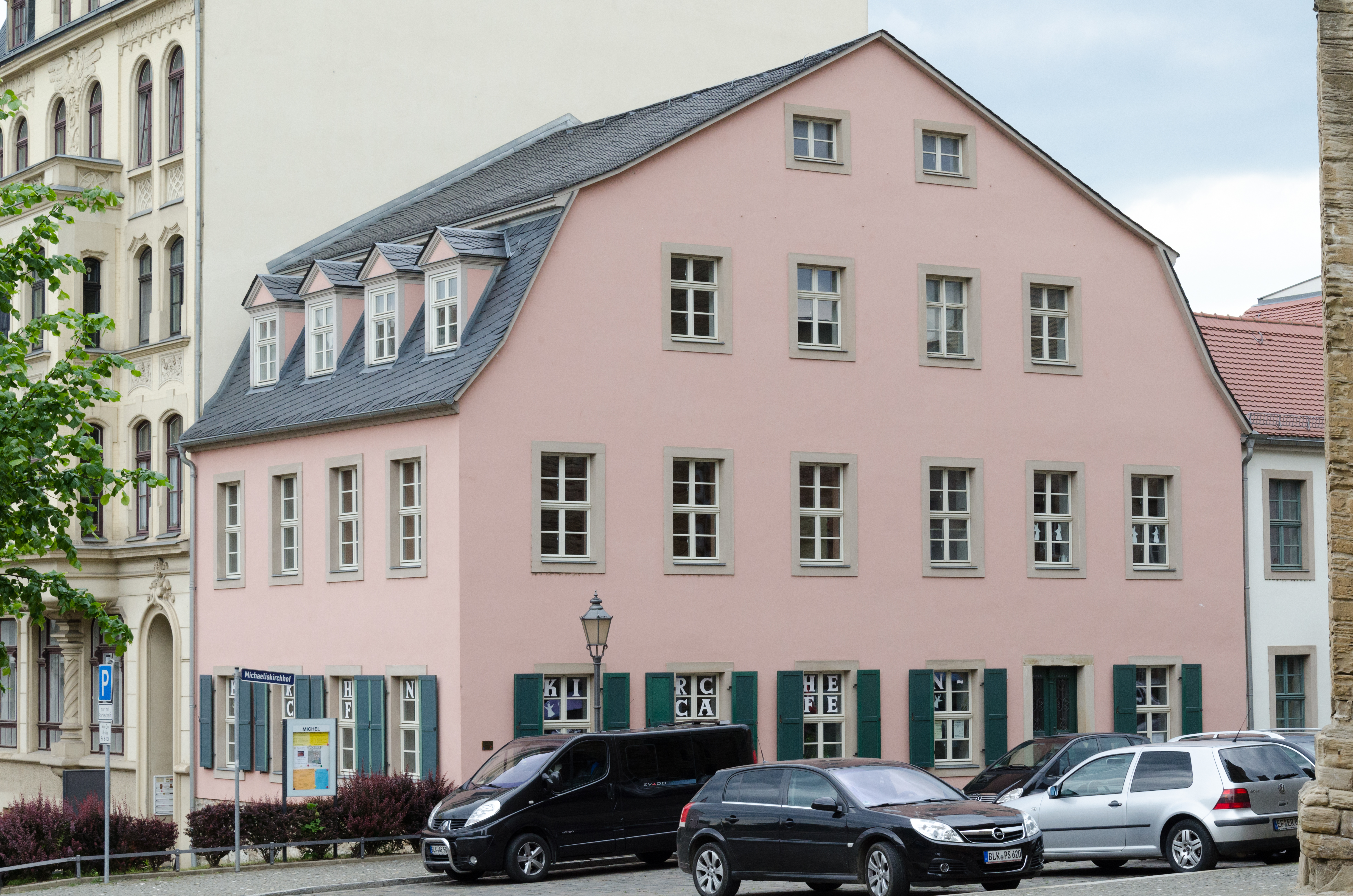 Zeitz, Michaeliskirchhof 11